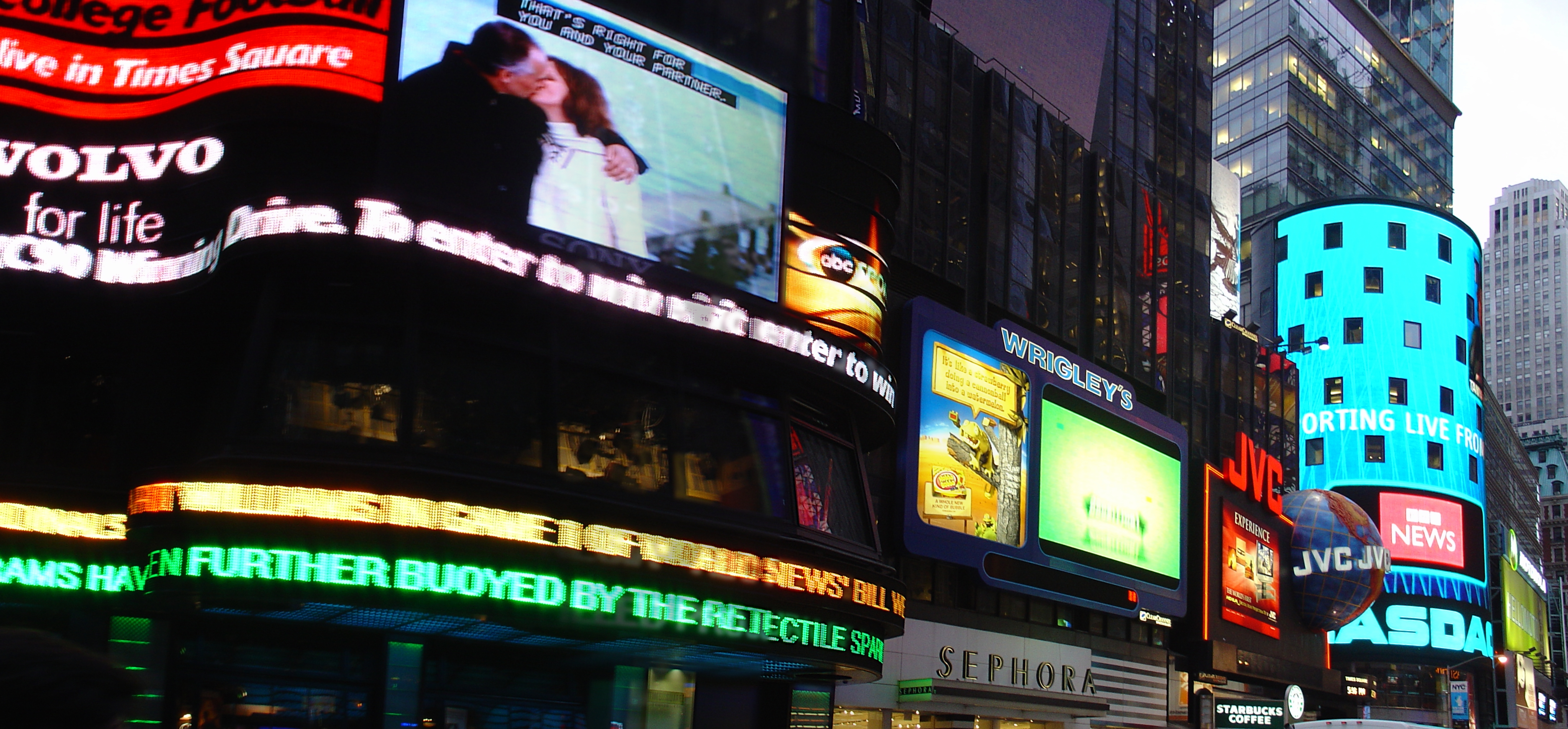 Photos de Times Square